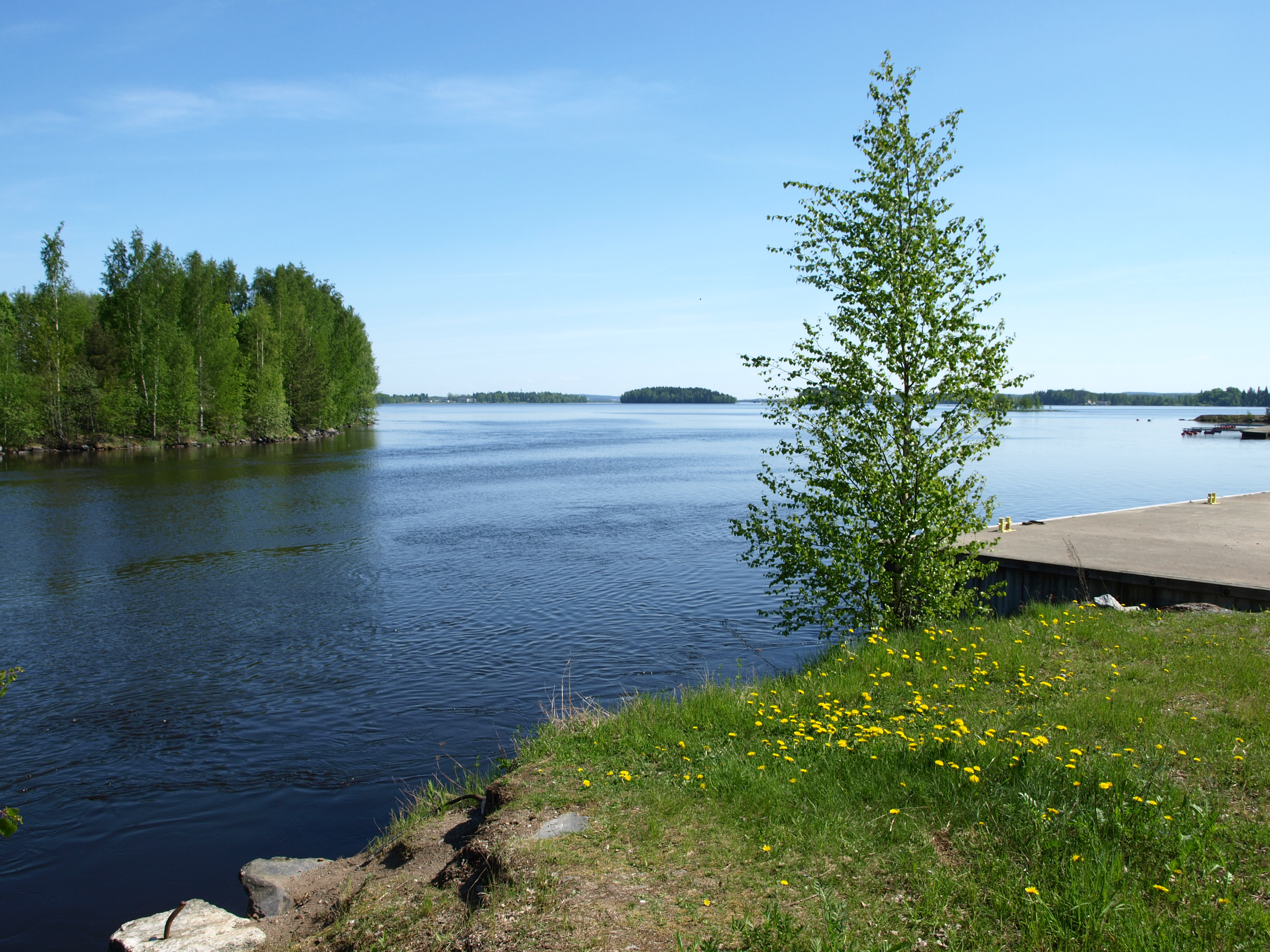 Pyhäjärven luusua Nokialla